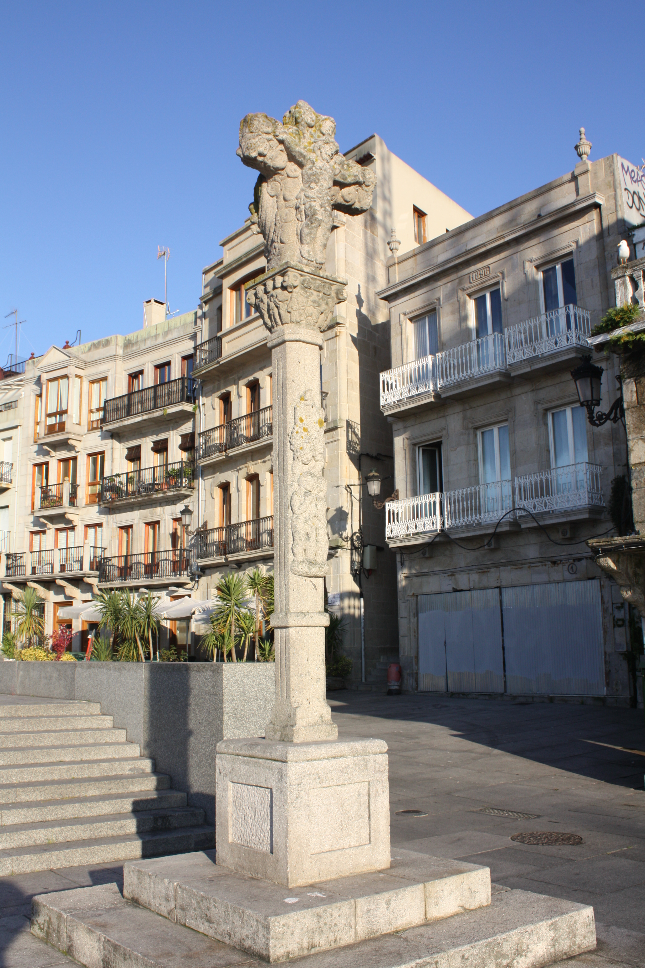 Cruceiro no Berbés (Vigo)